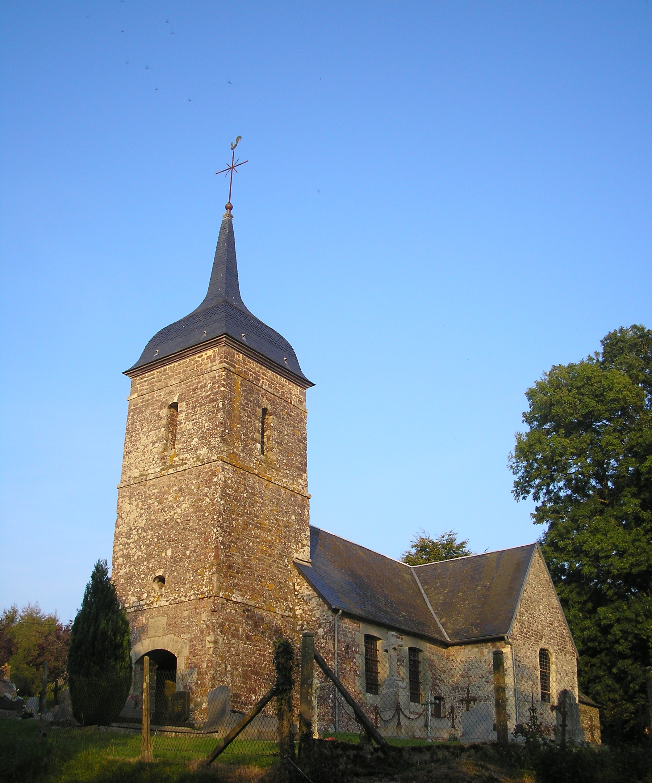 Montamy (Normandie, France). L'église.